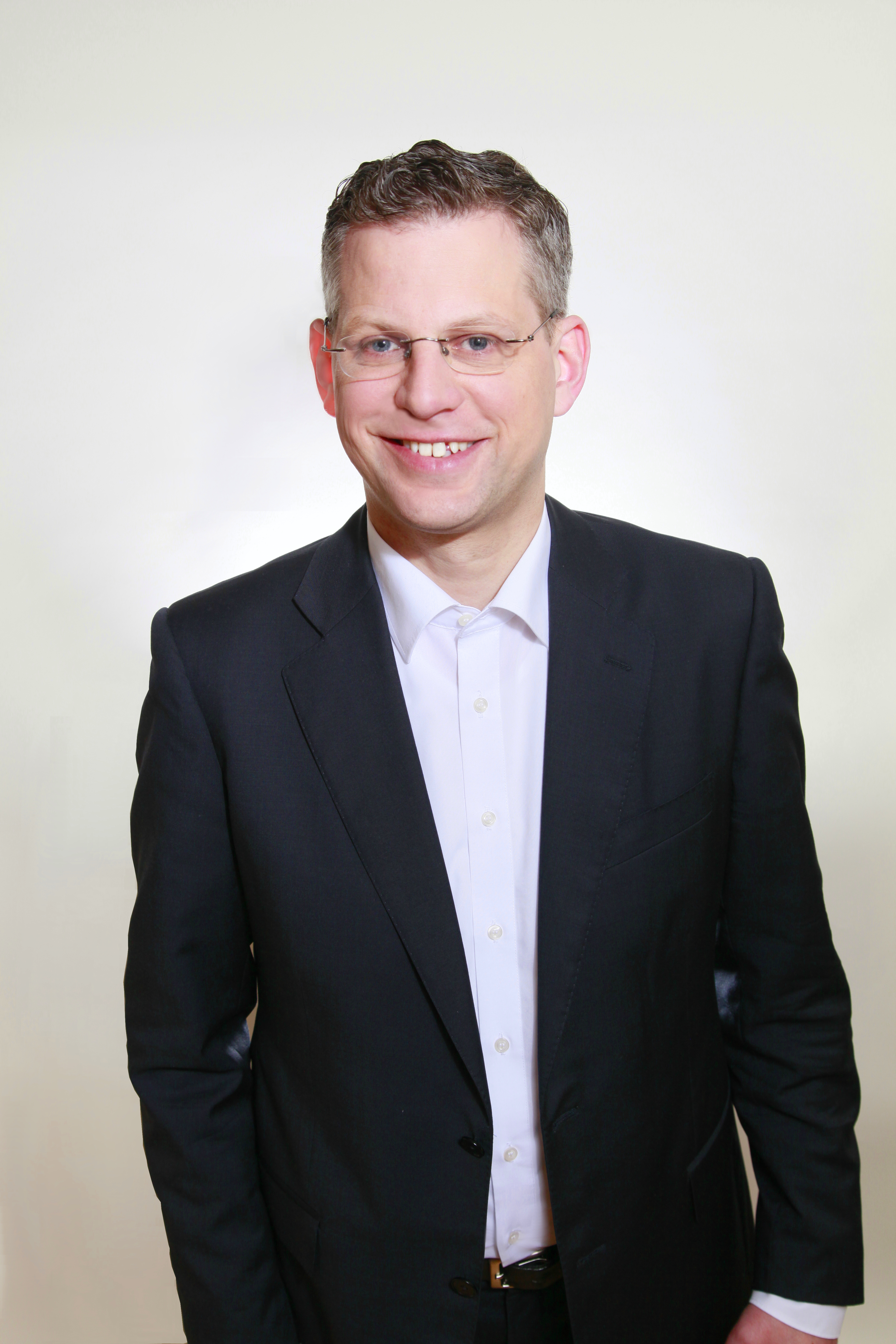 Christoph de Vries im März 2017